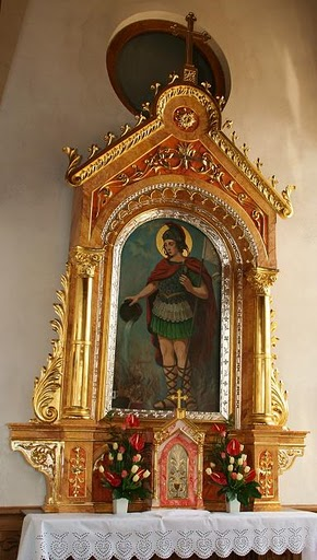 Ołtarz boczny w kosciele pod wezwaniem św. floriana w Dlugopolu na Podhalu